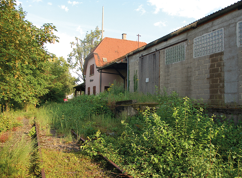 Gleisseite der Station Möglingen (von Westen)